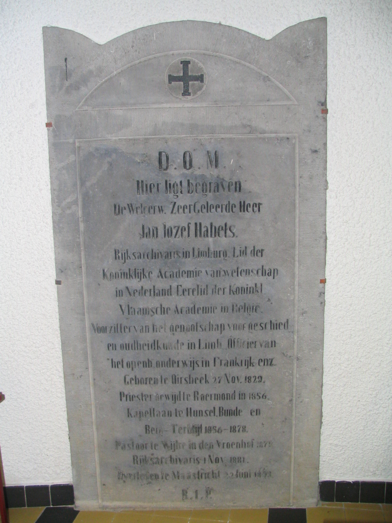 Graf van Jozef Habets, te vinden in de Sint Lambertuskerk van Oirsbeek in de ruimte onder het altaar.